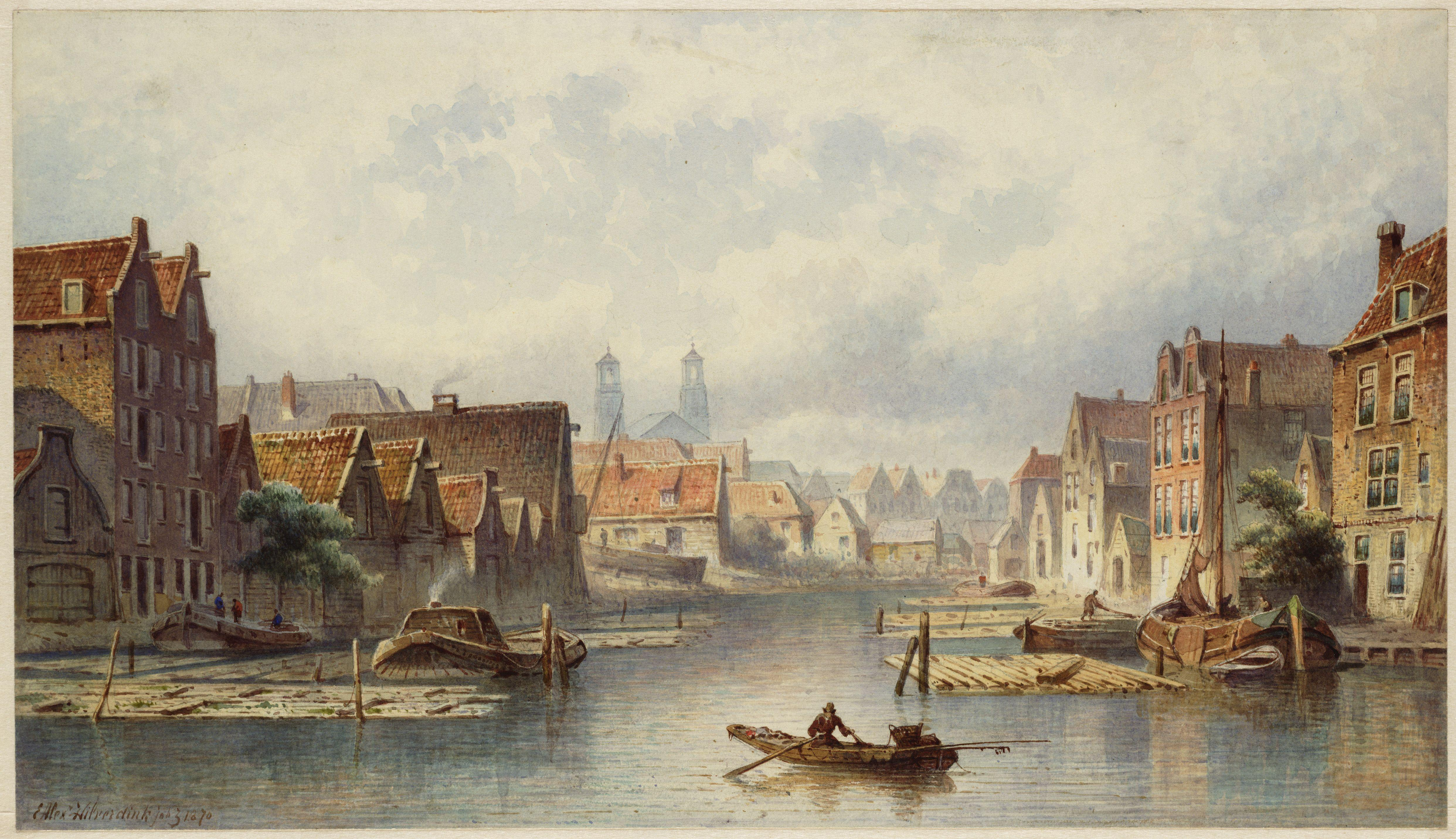 Beschrijving De Uilenburgergracht, op de achtergrond de torens van de Mozes en Aäronskerk gezien naar Houtkopersburgwal met in het verschiet de Mozes en Aäronkerk. Documenttype tekening Vervaardiger Hilverdink, E. A. Collectie Collectie Atlas Dreesmann Datering 3 januari 1870 Geografische naam Uilenburgergracht Inventarissen Afbeeldingsbestand 010094000151